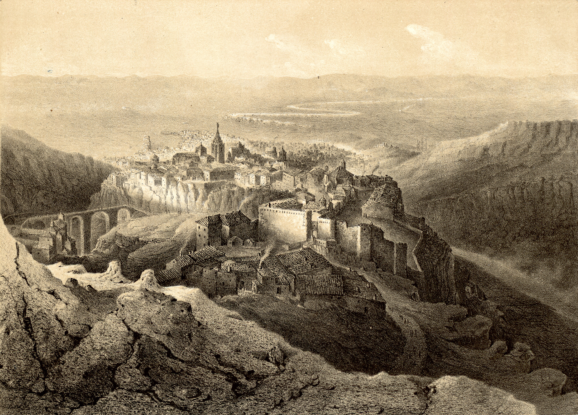 Cuenca (desde el cerro de San Cristoval).